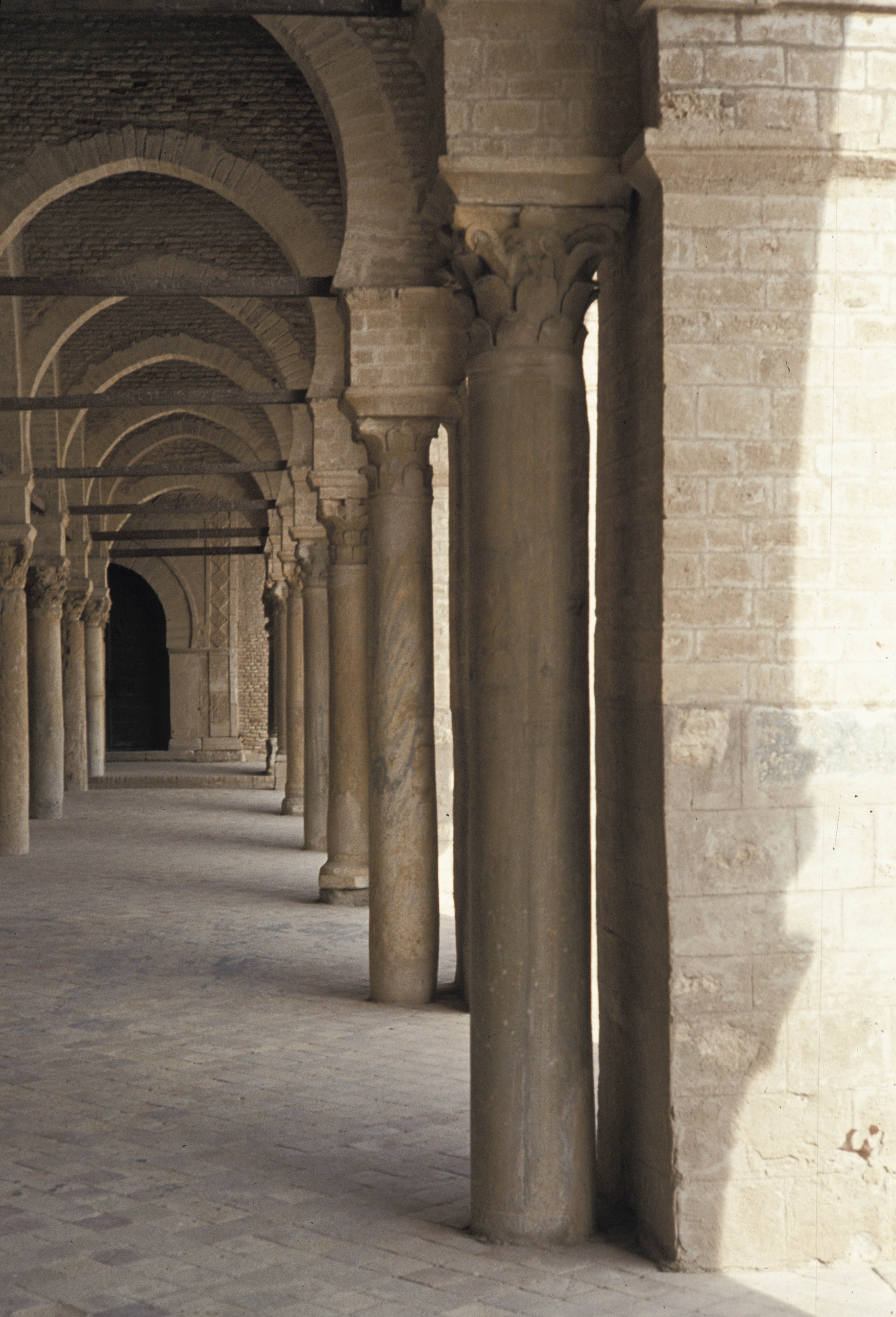 Tunisia